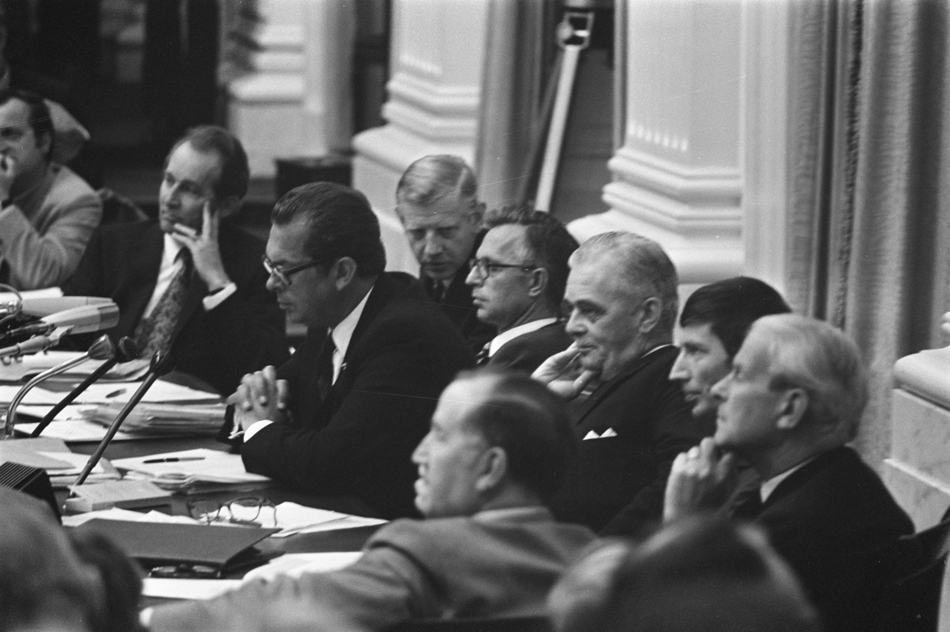 De overgebleven bewindslieden van het Kabinet-Biesheuvel II tijdens een debat in de Tweede Kamer op 17 augustus 1972